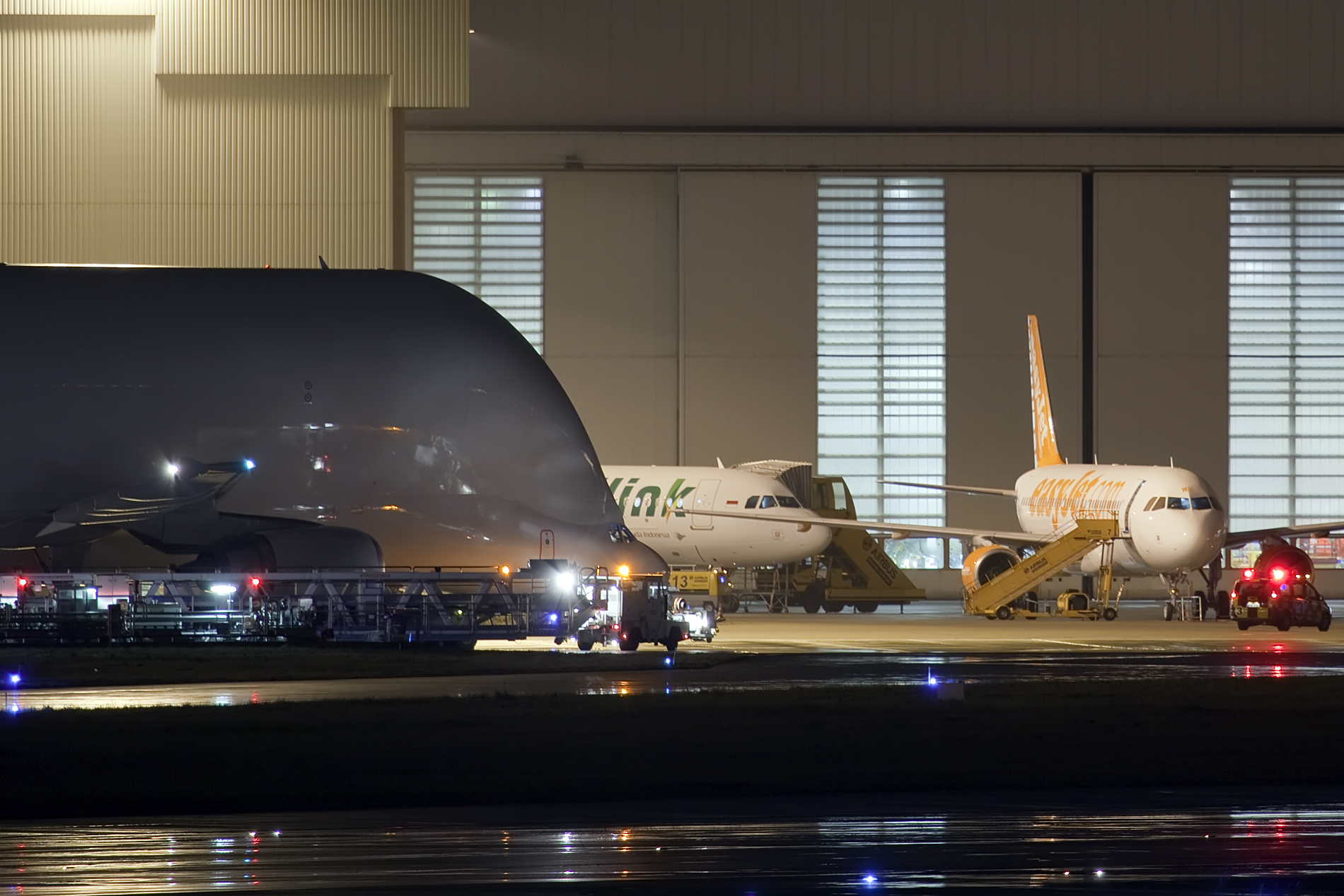 Hamburg- Finkenwerder